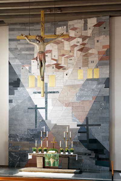 Altarbild der Christurkirche